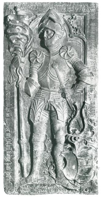 Grabstein von Herrn Virgil von Graben, Michaelskirche, Lienz, Osttirol. Virgil von Graben, auch Virgil vom Graben zu Sommeregg (* im 15. Jahrhundert auf Burg Sommeregg; † 1507 ebenda), Burggraf und Herr von Sommeregg, war einer der bedeutendsten Edelmänner und Amtsträger in der Grafschaft Görz und im Habsburgerreich Friedrichs III. und Maximilians I.